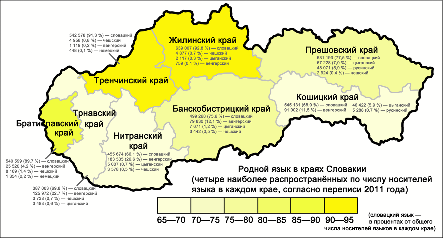 Родной язык в краях Словакии (по результатам переписи 2011 года). По четыре наиболее распространённых по числу носителей языка в каждом крае Словакии: Štatistický úrad Slovenskej republiky; Štatistický úrad Slovenskej republiky. Products. Katalóg publikácií; Štatistický úrad Slovenskej republiky. Products. Katalóg publikácií. Základné údaje zo Sčítania obyvateľov, domov a bytov 2011, obyvateľstvo podľa materinského jazyka (03.07.2012), s. 10